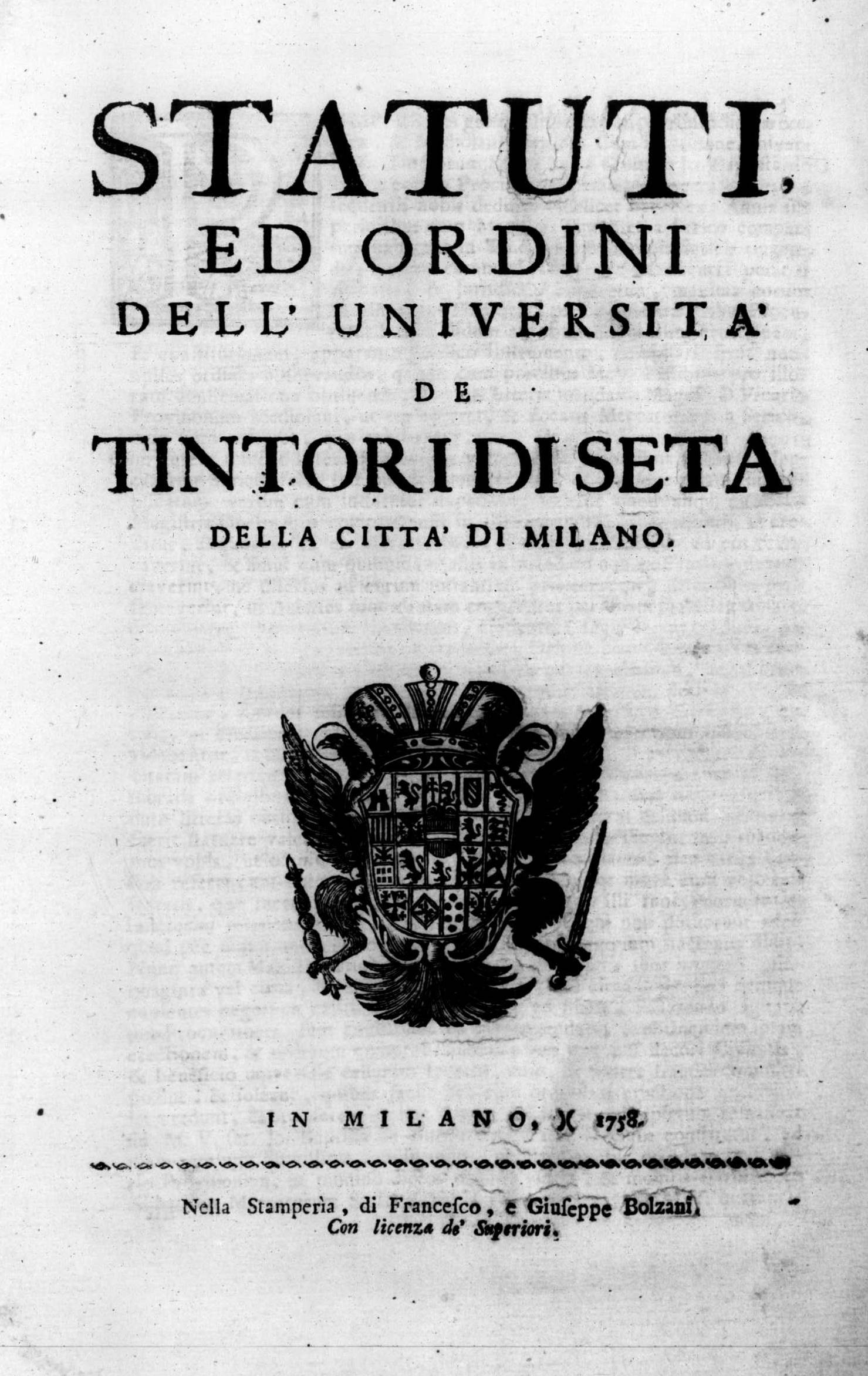 Frontespizio